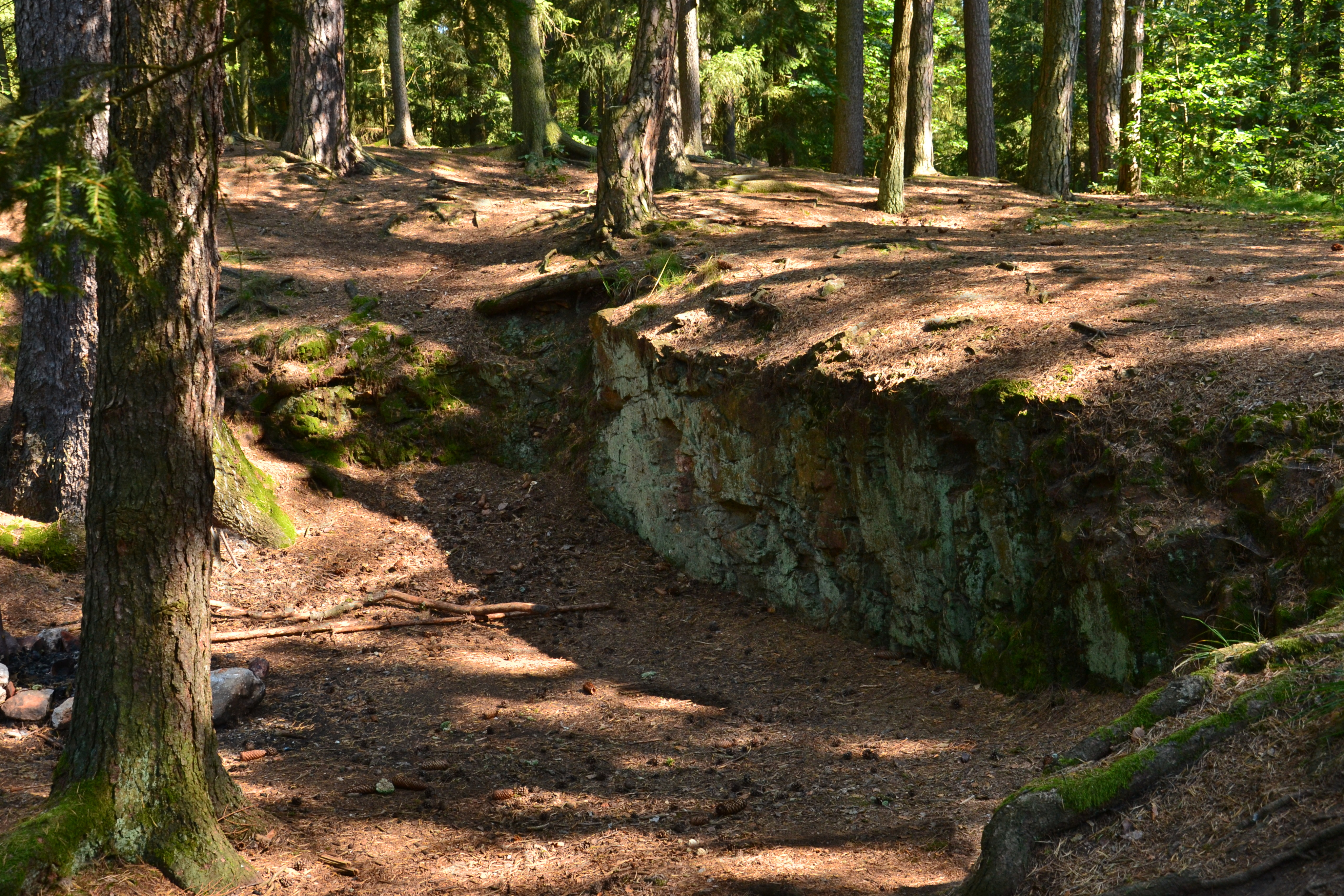 Do skály vysekaný objekt (snad zemnice)